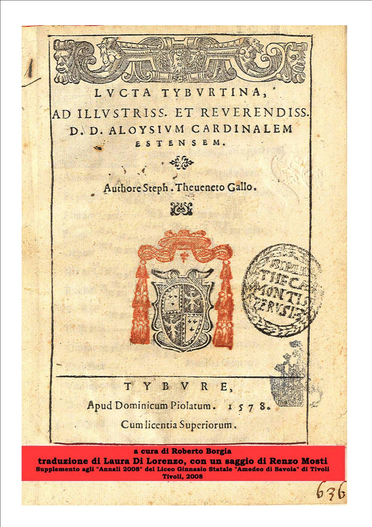 La copertina del volume LUCTA TYBURTINA, di Estienne Thevenet del 1578, ripubblicato dal Liceo classico statale Amedeo di Savoia di Tivoli nel 2008, a cura di Roberto Borgia.